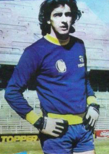 Jorge Fossatti